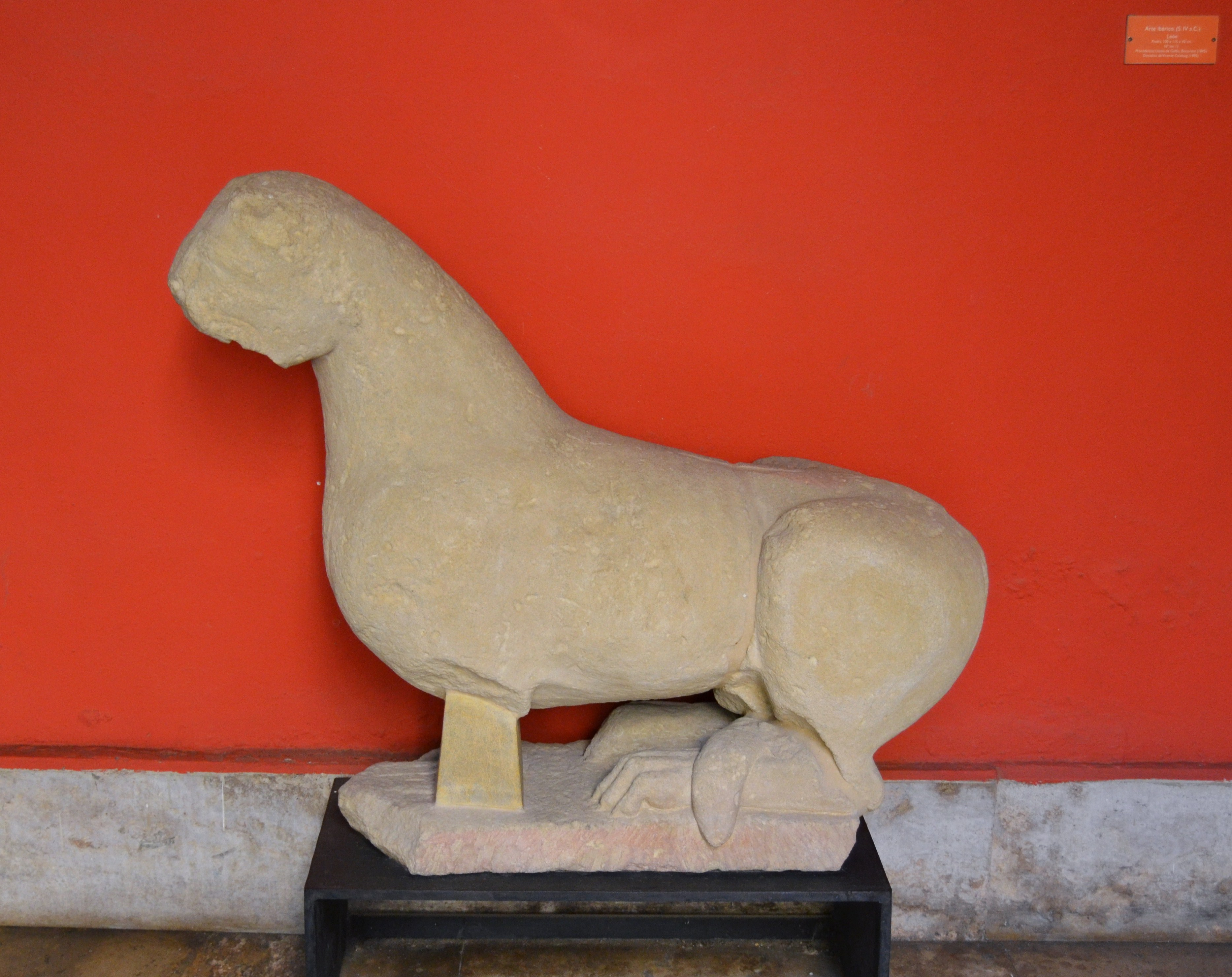 Lleó de Bocairent, escultura ibèrica del segle IV aC. Procedeix de la Lloma de Galbis de Bocairent, trobat el 1845. Pedra, 100 x 115 x 42 cm. Museu de Belles Arts de València.